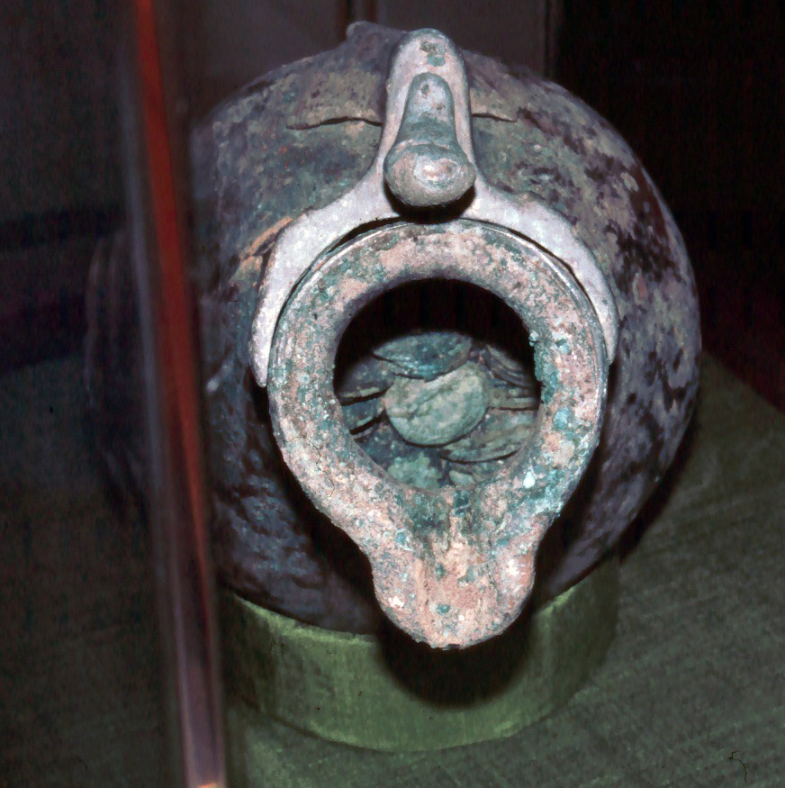 Der römische Münzfund von Neftenbach (ZH)